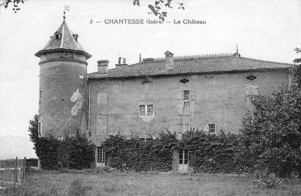 Chateau de Chantesse, Isère, France, sur une carte postale ancienne.